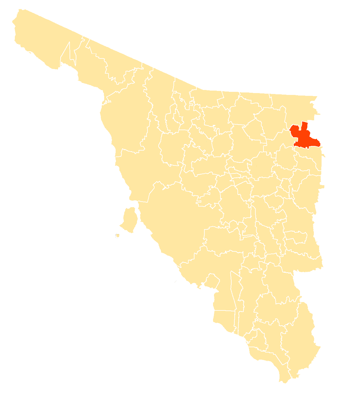 Municipio en Sonora, México.